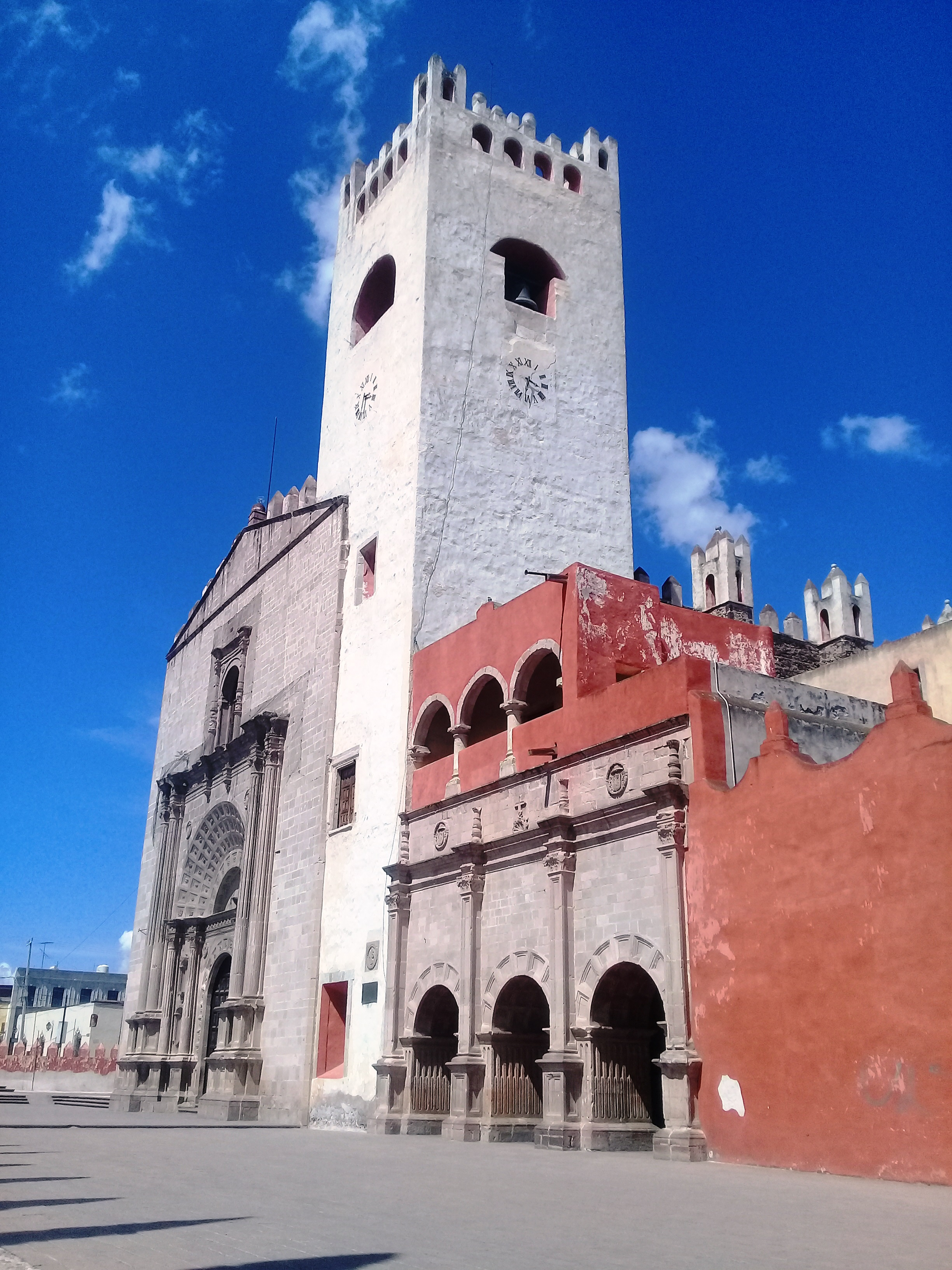 Templo y exconvento de San Nicolás de Tolentino (Actopan).